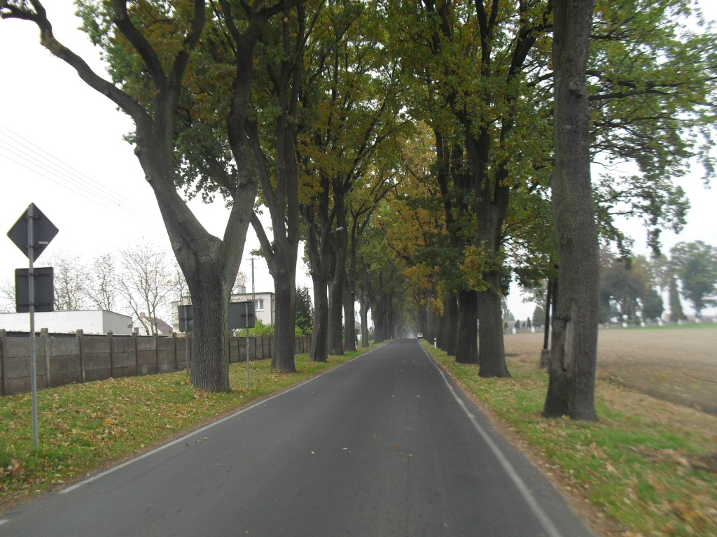 Aleja dębowa w Laskowicach w kierunku Krąplewic.